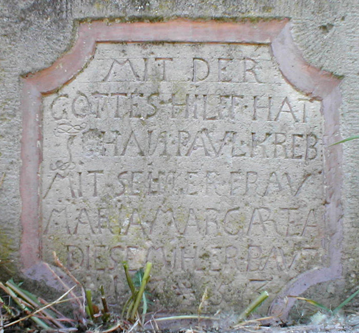 Besitzerinschrift der ehemaligen Oberen Mühle in Kirchardt-Berwangen von 1753. Foto vom April 2007. Der Inschriftstein wurde im Spätjahr 2007 leider entwendet.